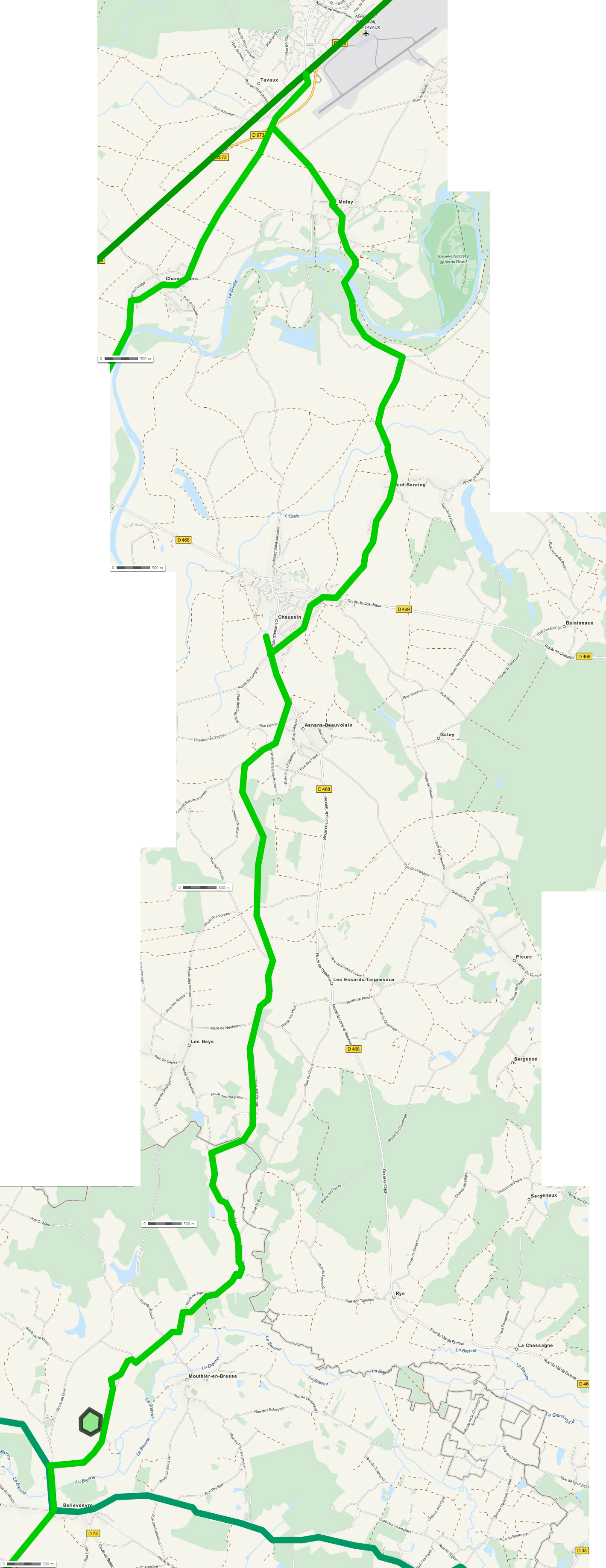 Karte der Römerstrasse von Louhans nach Tavaux - Teilstück Bellevesvre bis Tavaux Carte de la voie romaine de Louhans à Tavaux - Partie de Bellevesvre à Tavaux This map may be incomplete, and may contain errors. Don't rely solely on it for navigation.